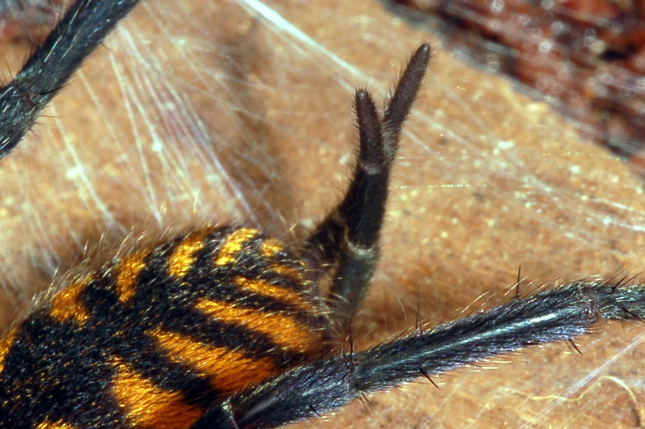 Doppelschwanzspinne Linothele fallax (Fam. Dipluridae) in Gefangenschaft, Museum Wiesbaden, Deutschland